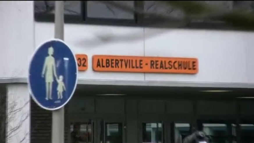 Albertville-Realschule, Winnenden